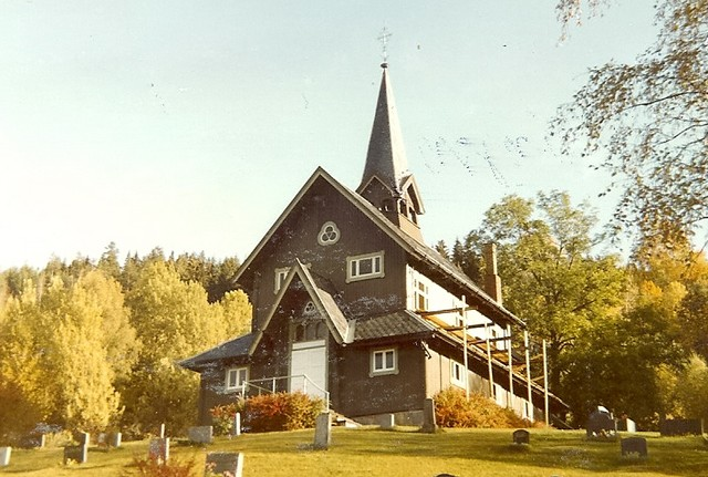 Strandlykkja kapell